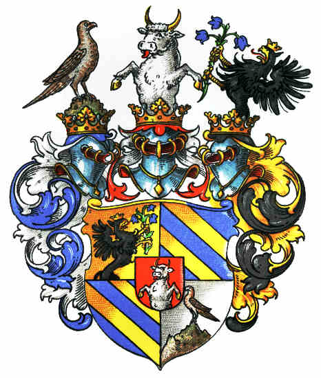 Wappen der Grafen und Herren von und zu Sprintzenstein und Neuhaus des Stammes Ritz